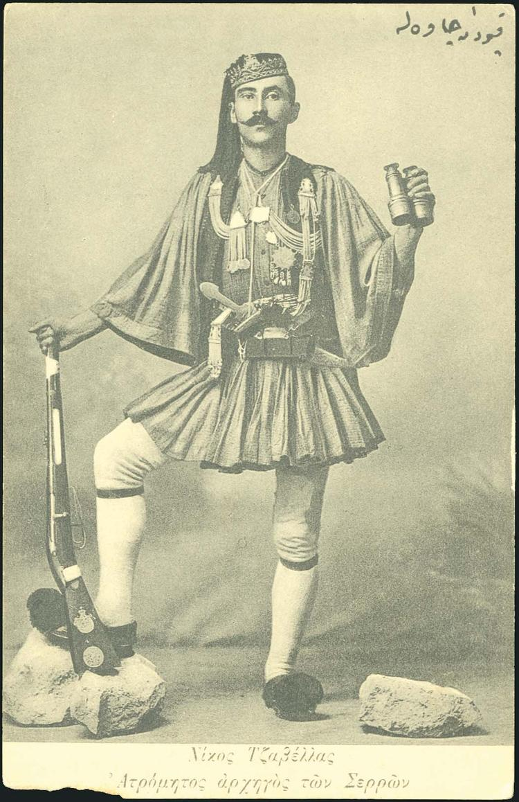 Никос Тзавелас.